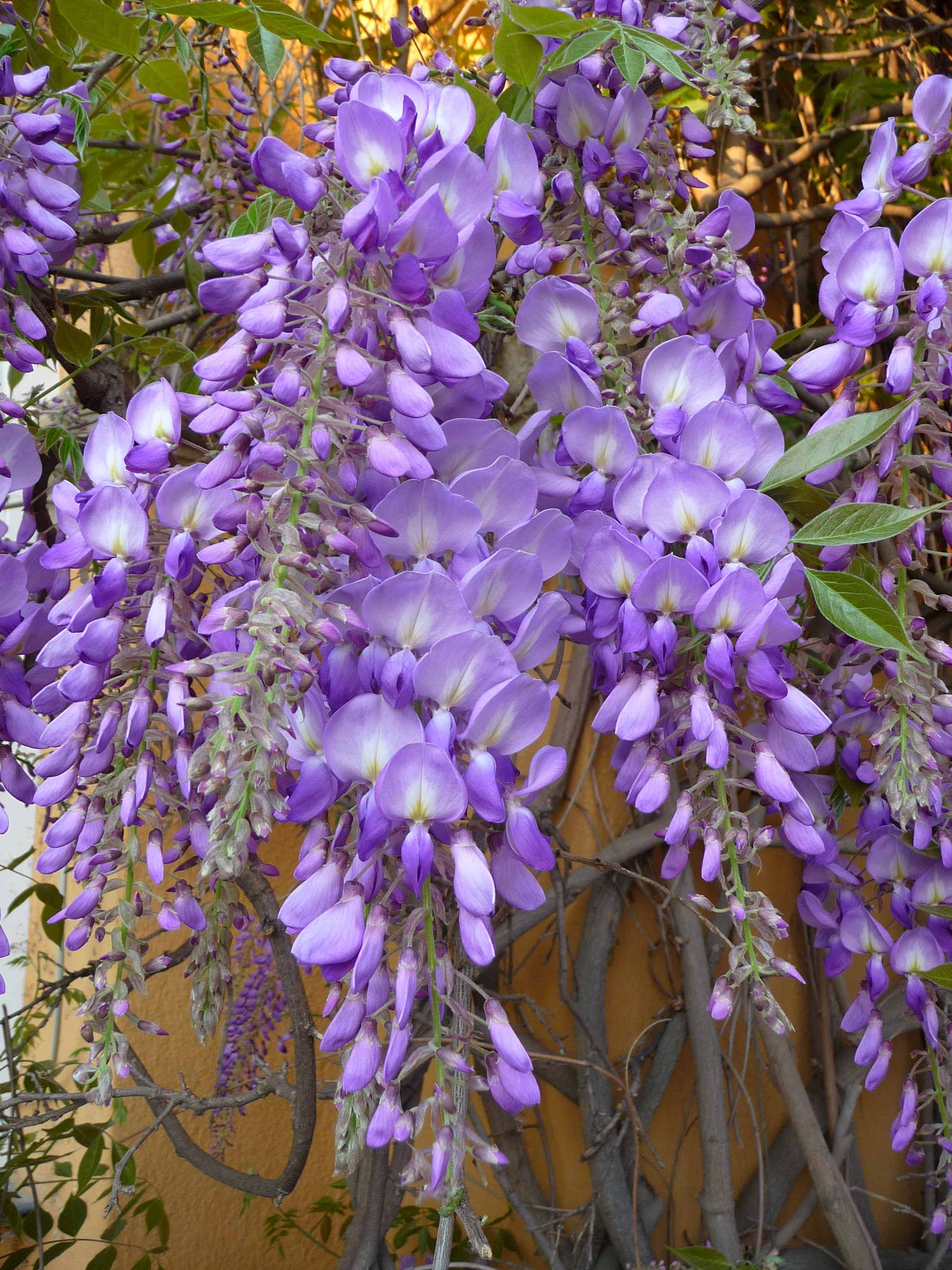 Chinesische Wisteria (Wisteria sinensis) / auch Chinesischer Blauregen genannt; Detail der Blütentraube